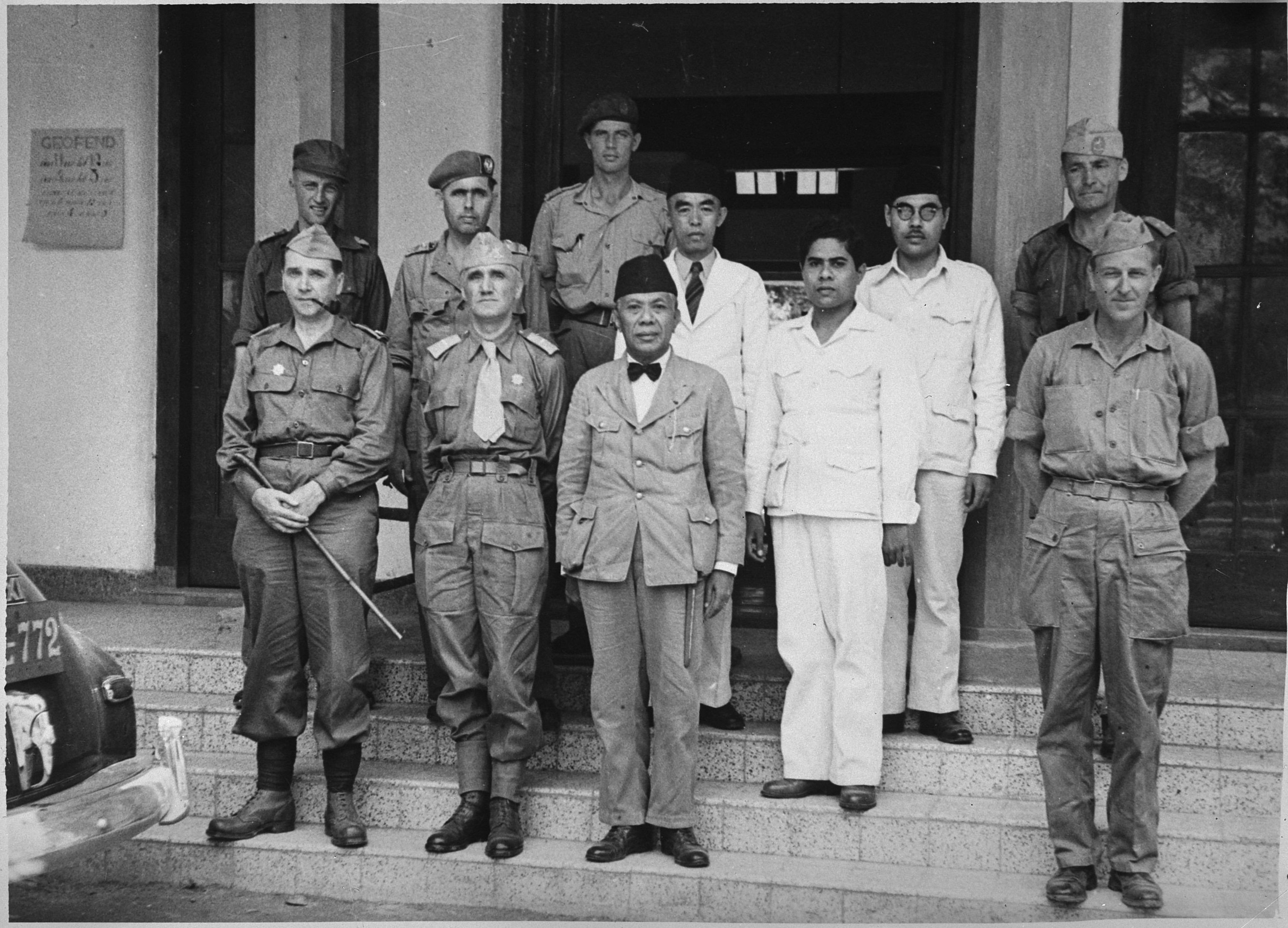 Collectie / Archief : Fotocollectie Anefo Reportage / Serie : [ onbekend ] Beschrijving : Madoera-Commissie. Te zien is o.a. de regent van Bangkalan: Cakraningrat/Tjakraningrat XII (1918-1945) met zijn zoon wrschl.Mr. R.A. Moh. Azis (Tjakraningrat XIII). Datum : 24 december 1947 Fotograaf : Fotograaf Onbekend / Anefo Auteursrechthebbende : Nationaal Archief Materiaalsoort : Glasnegatief Nummer archiefinventaris : bekijk toegang 2.24.01.09 Bestanddeelnummer : 902-5251